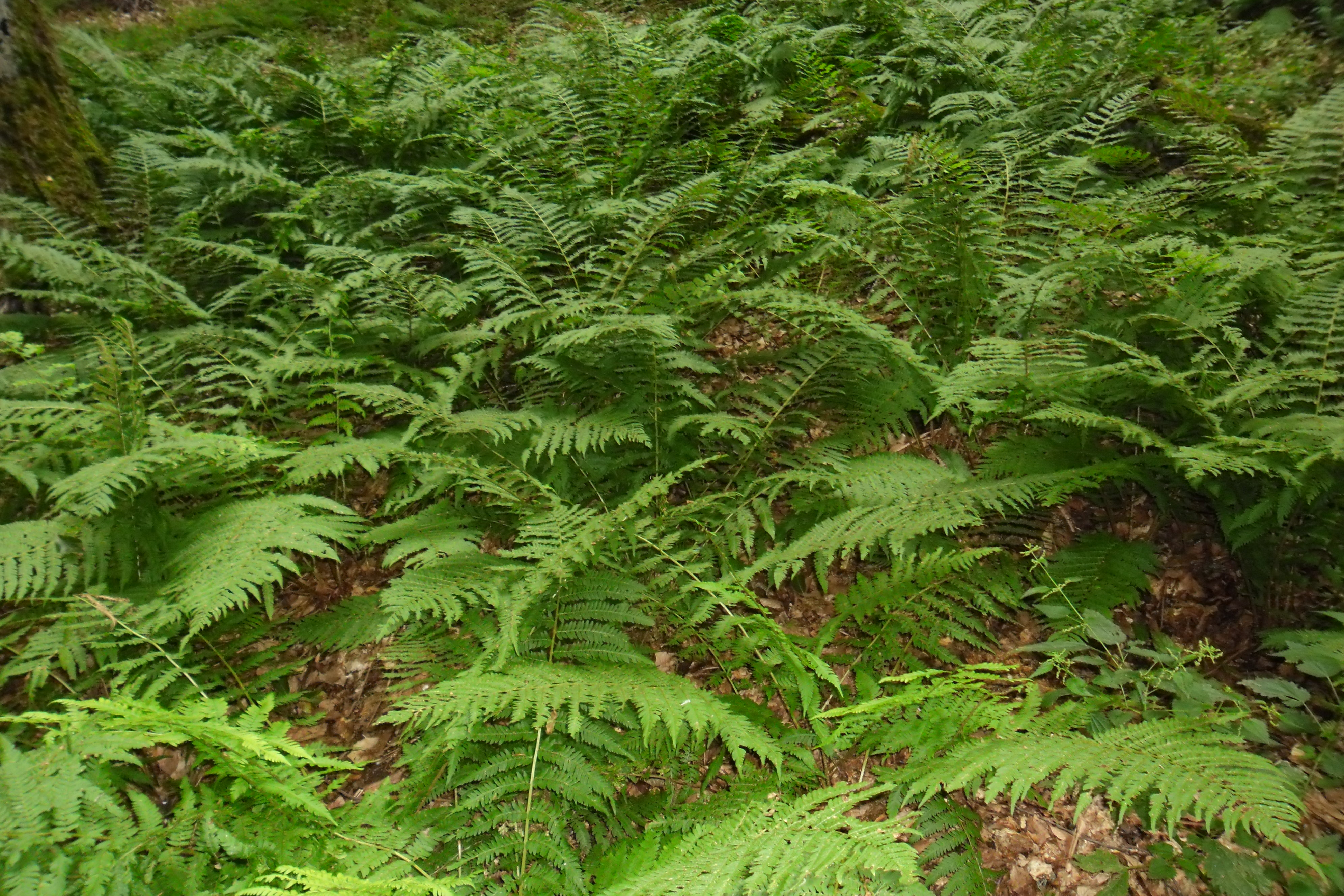 Фото